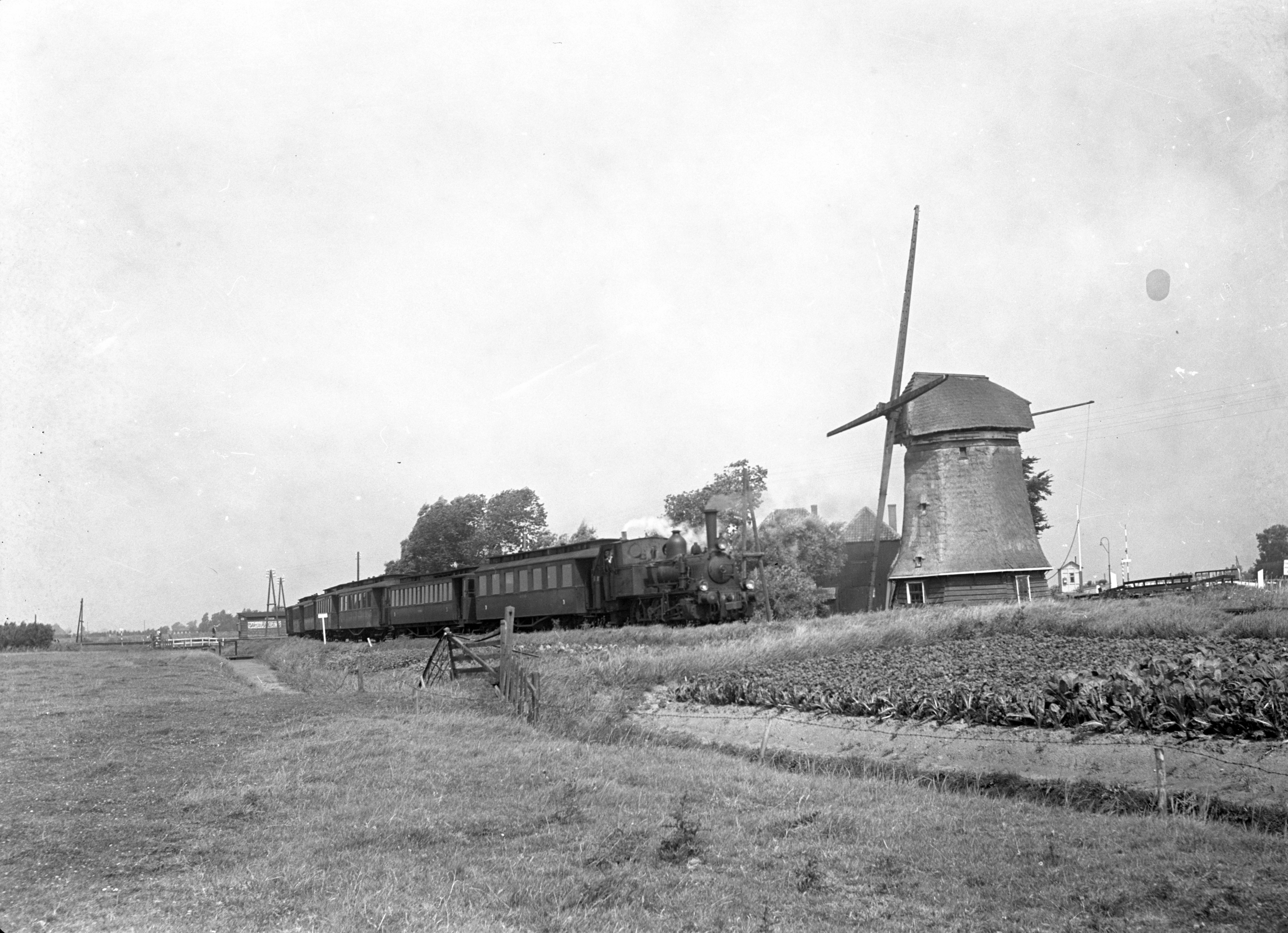 Afbeelding van de stoomlocomotief nr. 7742 (serie 7700, "Bello") van de N.S. met rijtuigen in een landschap met molen te Koedijk.